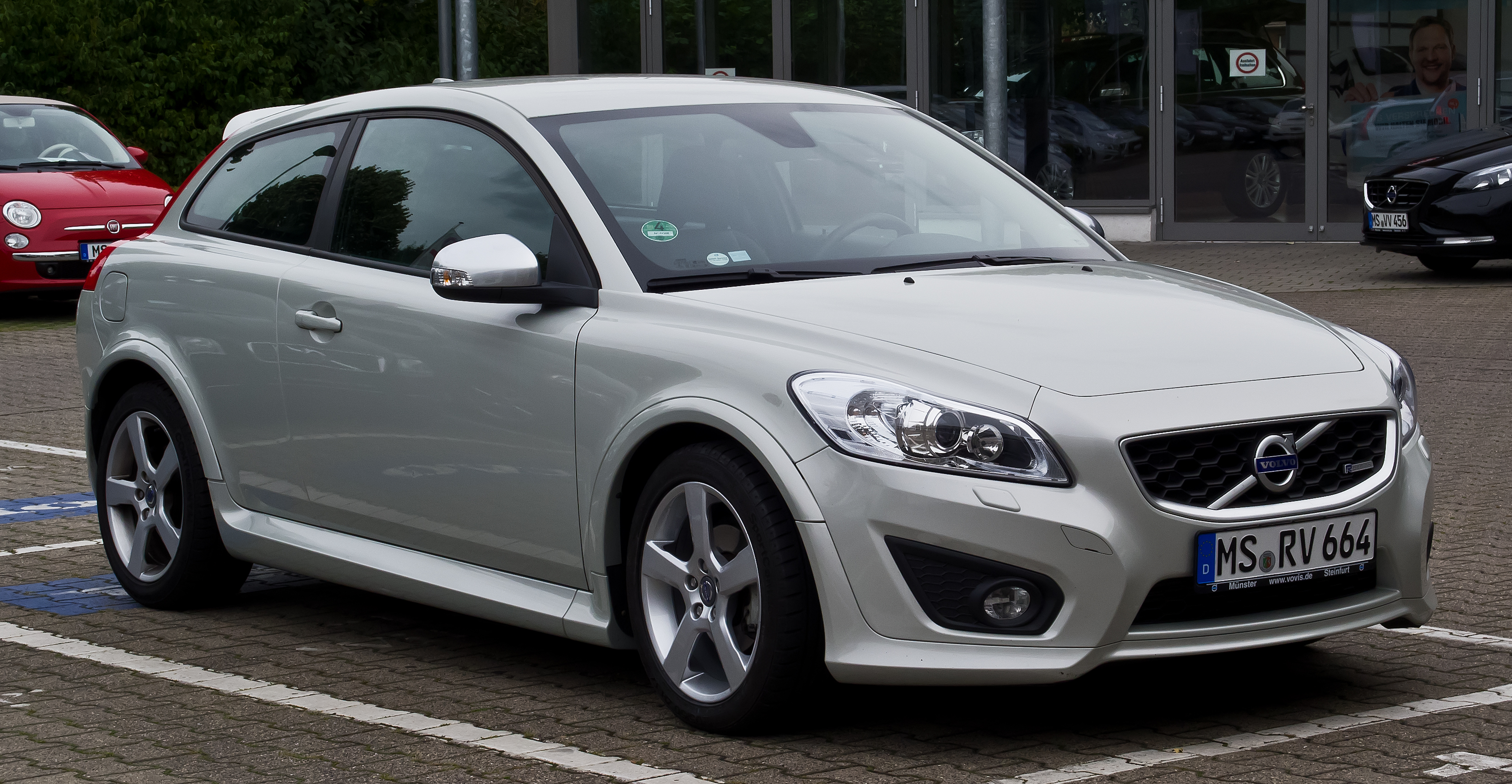 Volvo C30 R-Design (Facelift)